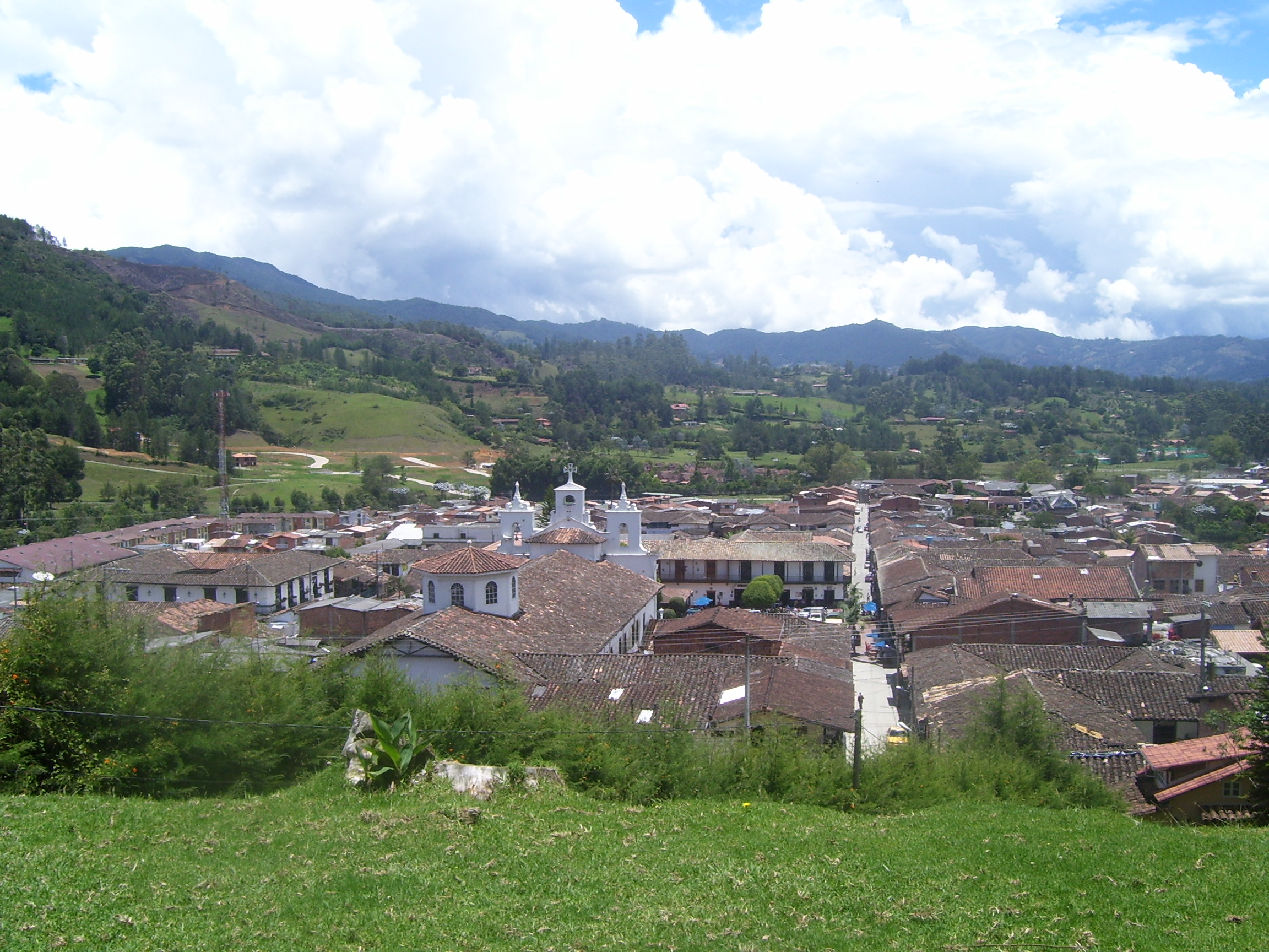 Municipio el Retiro, Antioquia, Colombia.